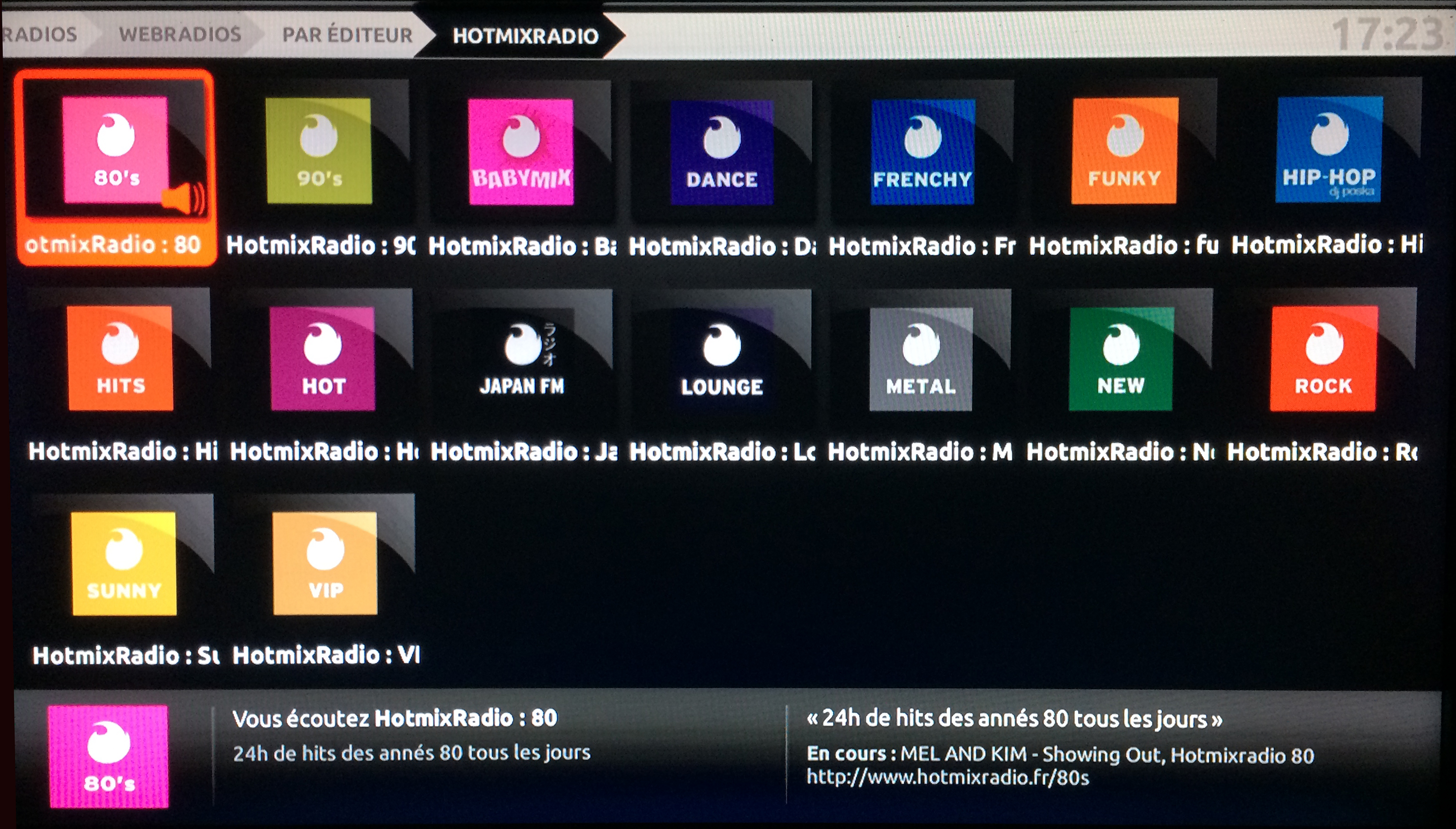 Capture d'écran su service Hotmixradio sur la Freebox